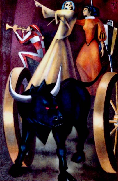 óleo sobre tela de 90 X 1,40 cm, assinada por Alcy Xavier, datado de 1985. Assunto: Carroça de saltimbancos da Idade Média, na Espanha, segundo o pintor, inspirado num capítulo da obra Dom Quixote, de Miguel de Cervantes de Saavedra.